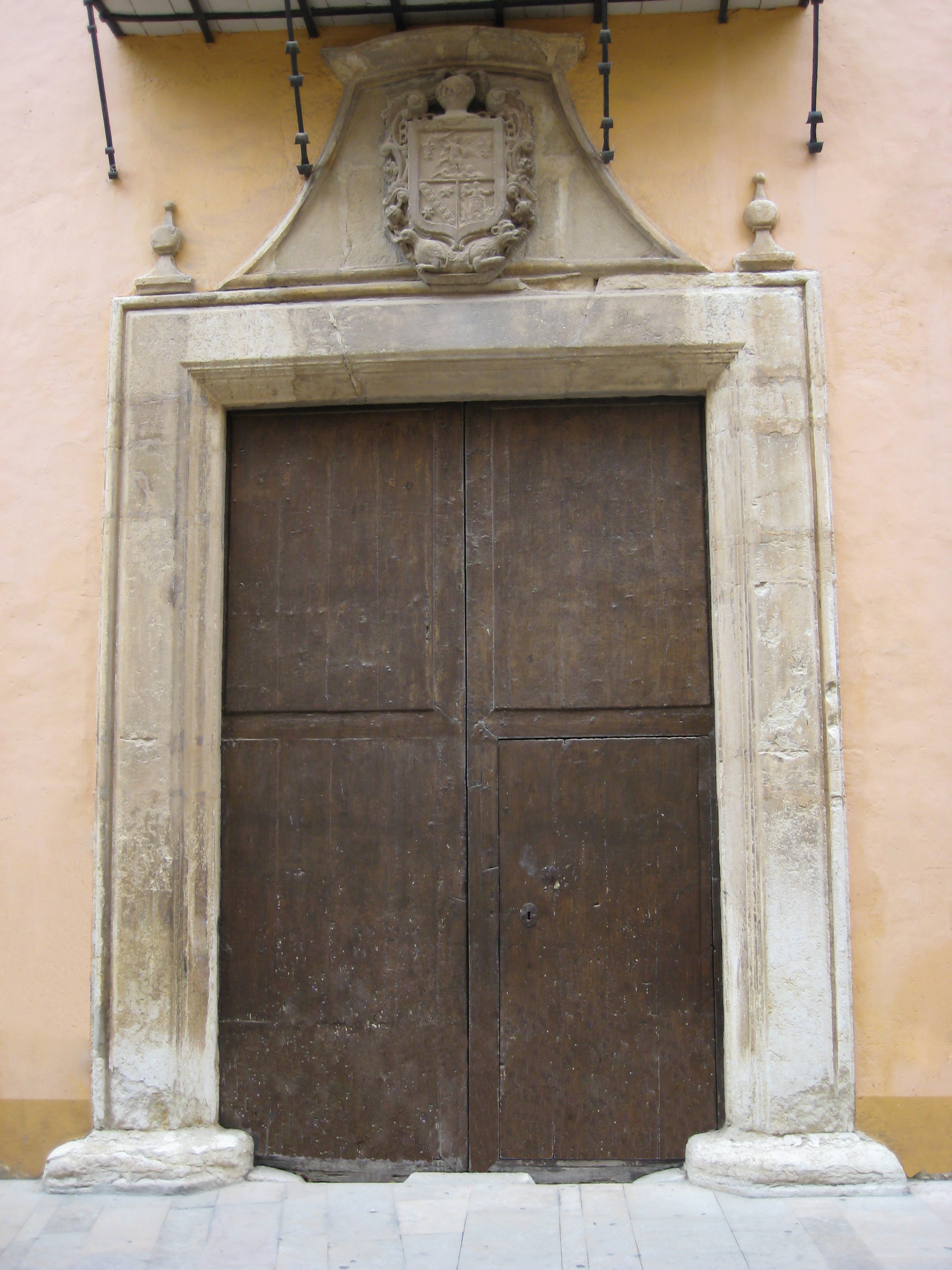 Portada de la Casa del Marqués de Benicarló, en Benicarló (Baix Maestrat)